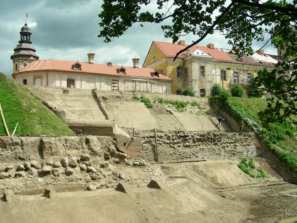 Беларуская (тарашкевіца): Палацава-паркавы ансамбль:замак-палац, паўднёвая і ўсходняя галерэі, камяніца, арсэнал з капліцай, брама, два прыбрамныя корпусы, паўночна-ўсходняя і паўднёва-заходняя галерэі, лядоўня, стайня;абарончыя збудаваньні і мост;тэрыторыя паркаў:Замкавы, Стары, Японскі, Ангельскі, Новы;водная сыстэма:Дзікі, Замкавы, Бэрнардынскі ставы. г. Нясьвіж This is a photo of Belarusian heritage monument. Reference number: 610Г000466 ( WLM)